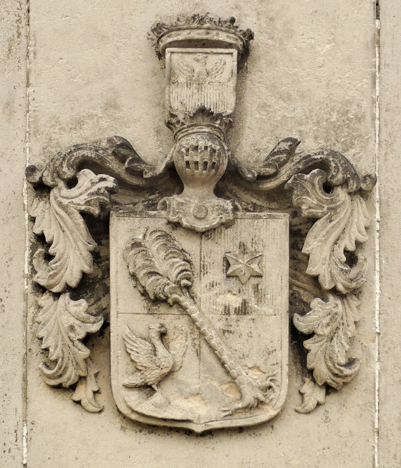 Herb von Osterberg